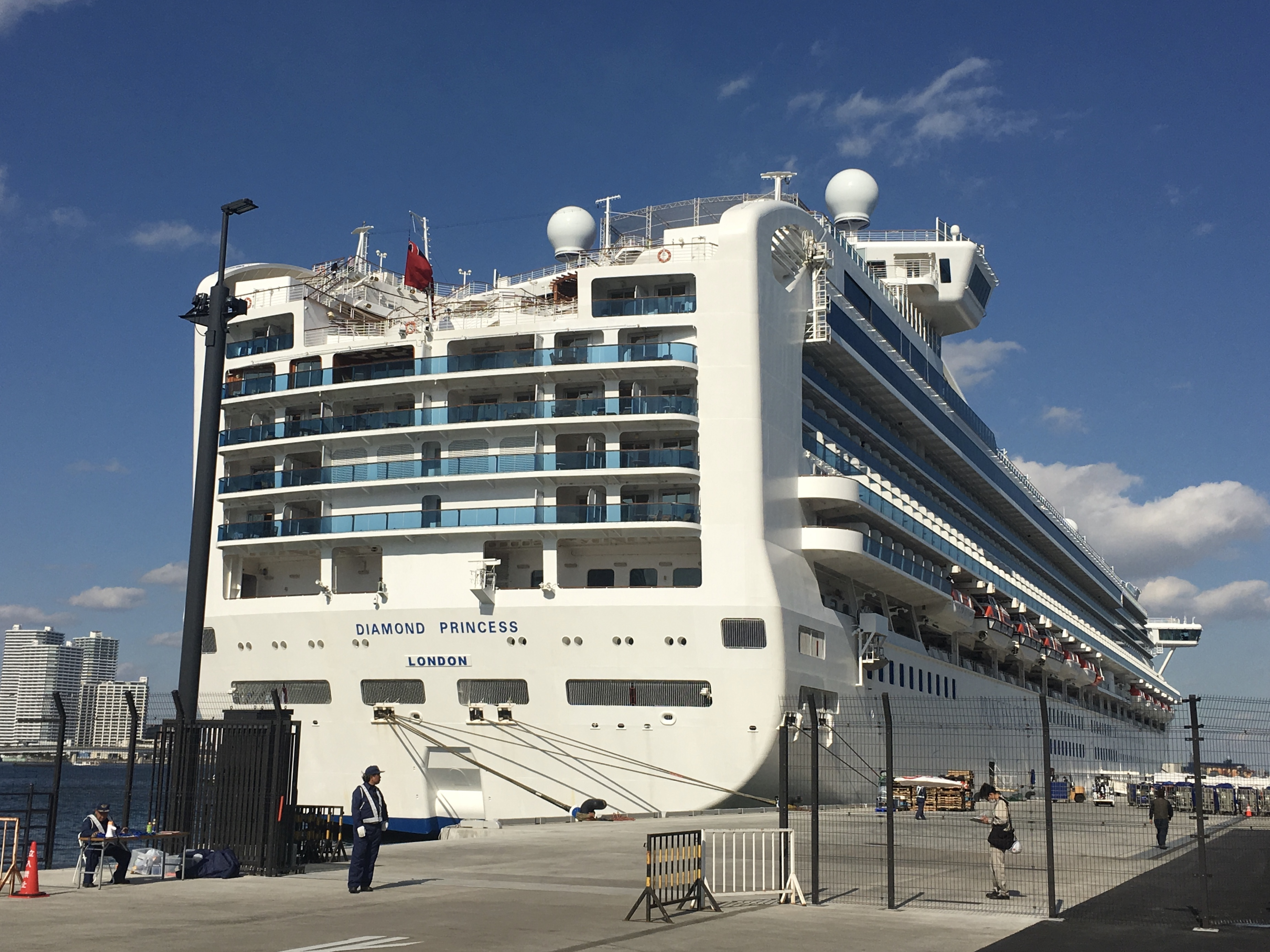 横浜市中区新港にある複合施設「横浜ハンマーヘッド」（新港ふ頭客船ターミナル）へ2019年11月4日に第一号入港したクルーズ客船「ダイヤモンドプリンセス」。